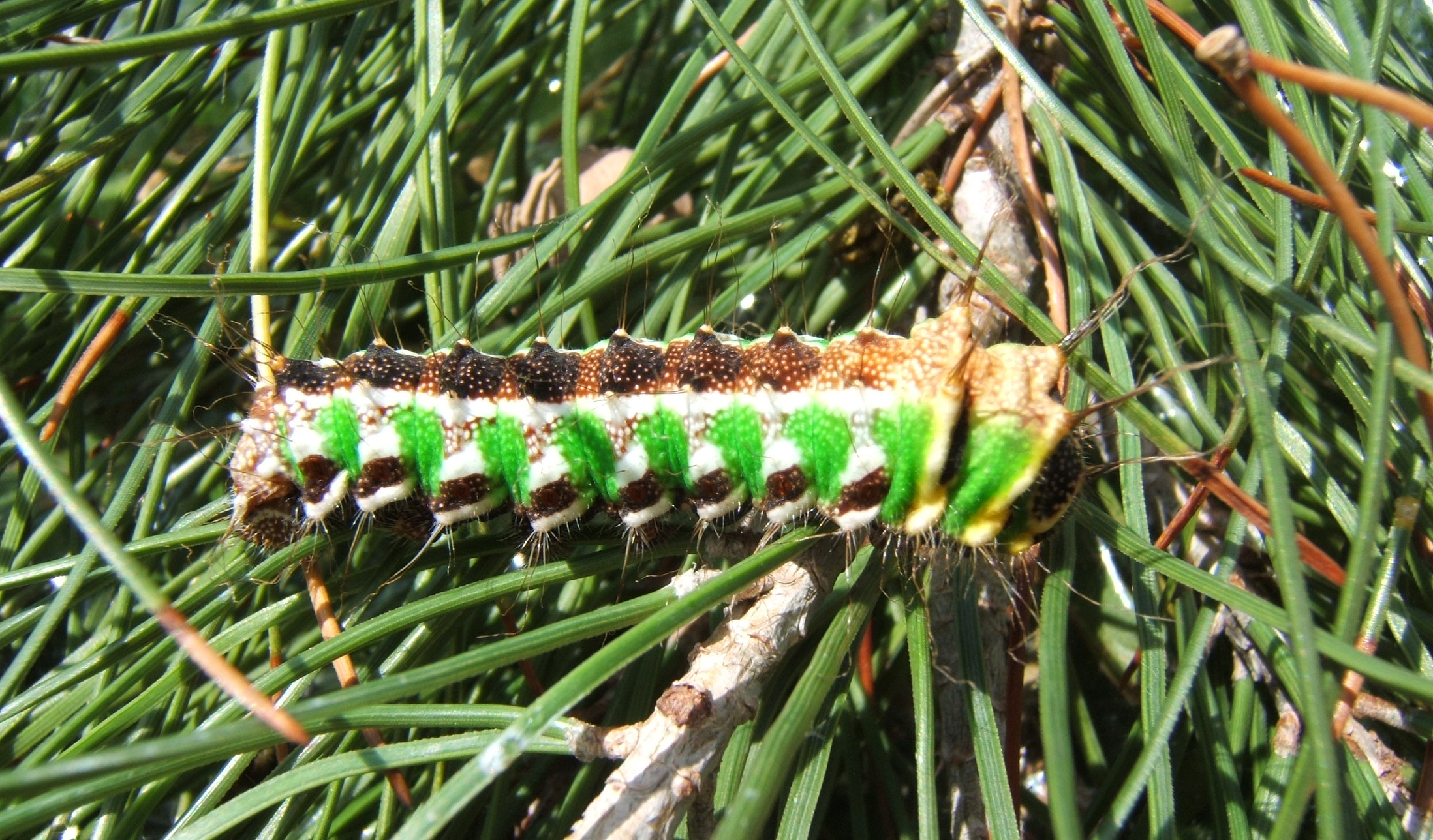 Graellsia isabellae 5th instar larva raised on Pinus.